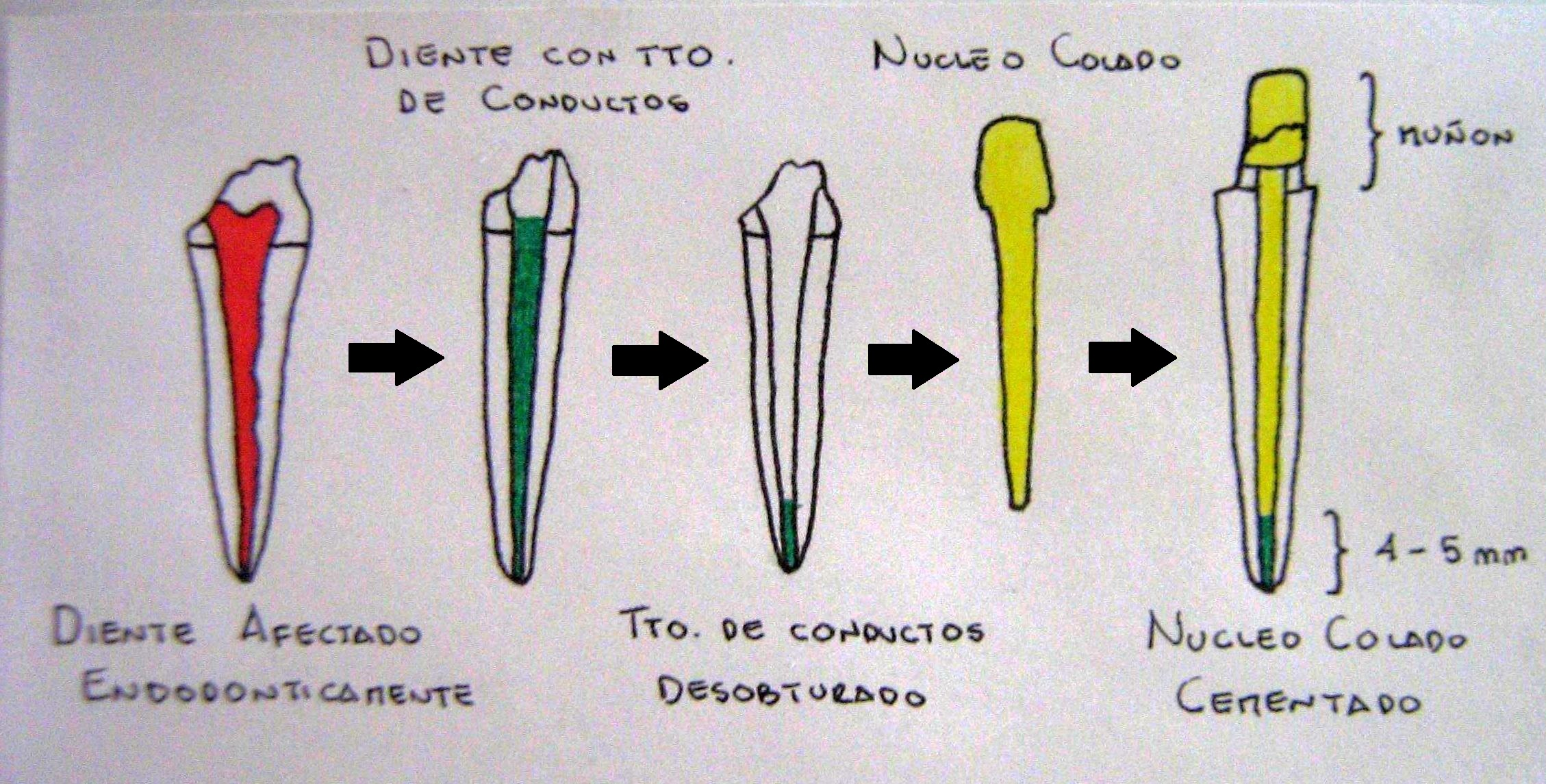 Pasos a seguir cuando se va a realizar un nucleo colado.